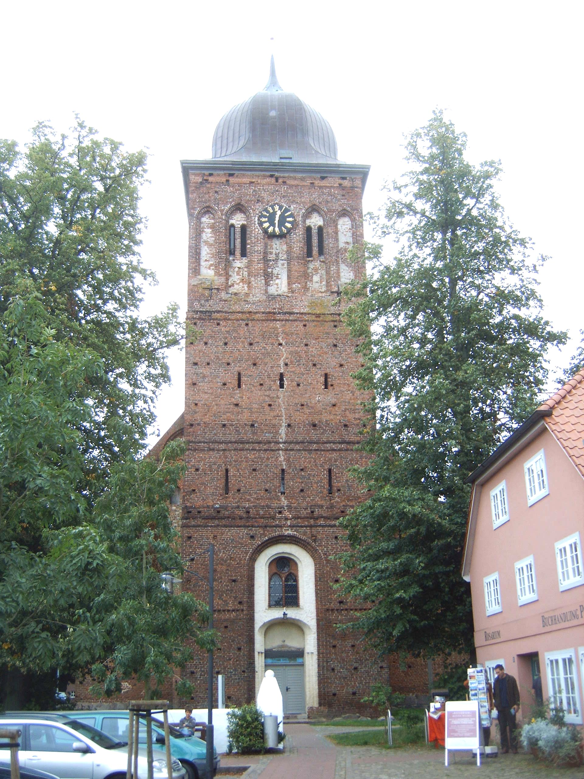 Sankt Jacob Kirche in Gingst auf Rügen, Deutschland